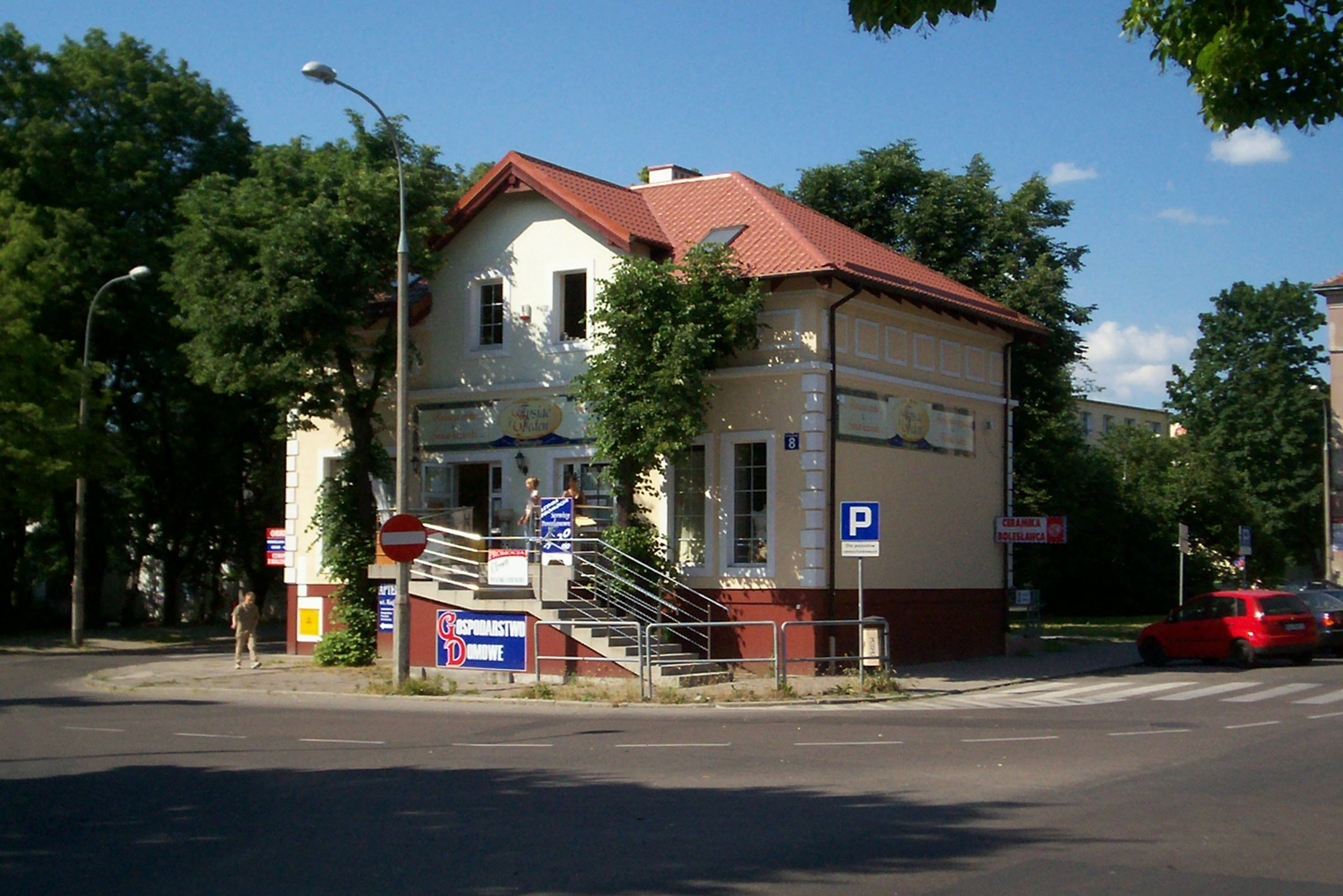 Olsztyn, Plac Kazimierza Pułaskiego 8